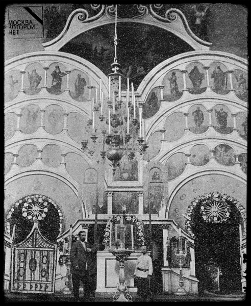 Внутренне убранство церкви Николая Чудотворца в Верхних Котлах, 1900-е гг.